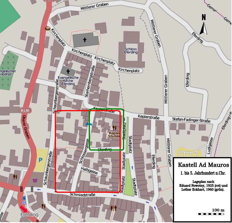 Lageplan des Kastell Eferding/OÖ (Ad Mauros) nach E. Nowotny, 1925 (rote Markierung) und L. Eckhart 1960 (grüne Markierung).